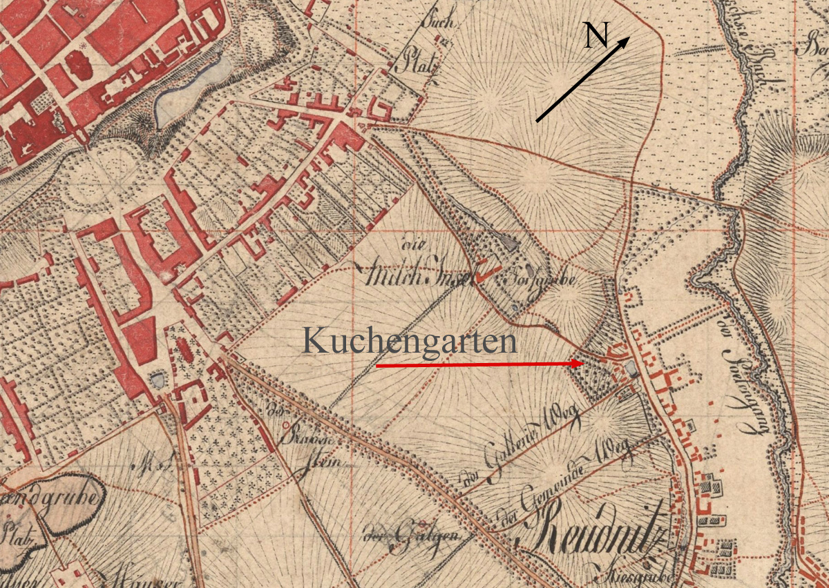 Der Kuchengarten in Reudnitz bei Leipzig, markiert auf einer Karte von 1802 (Ausschnitt aus Meilenblätter von Sachsen 1780-1806)